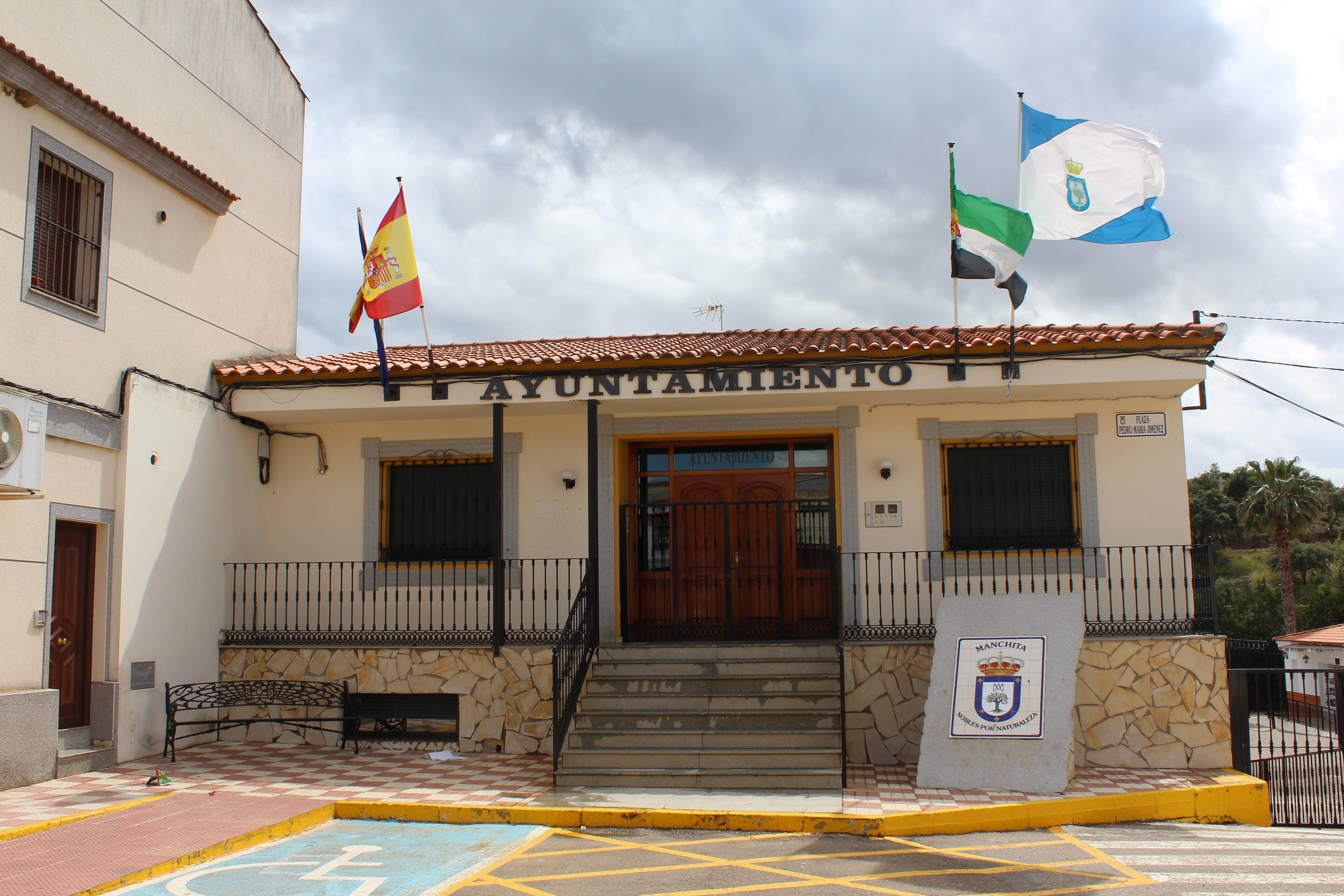 Ayuntamiento